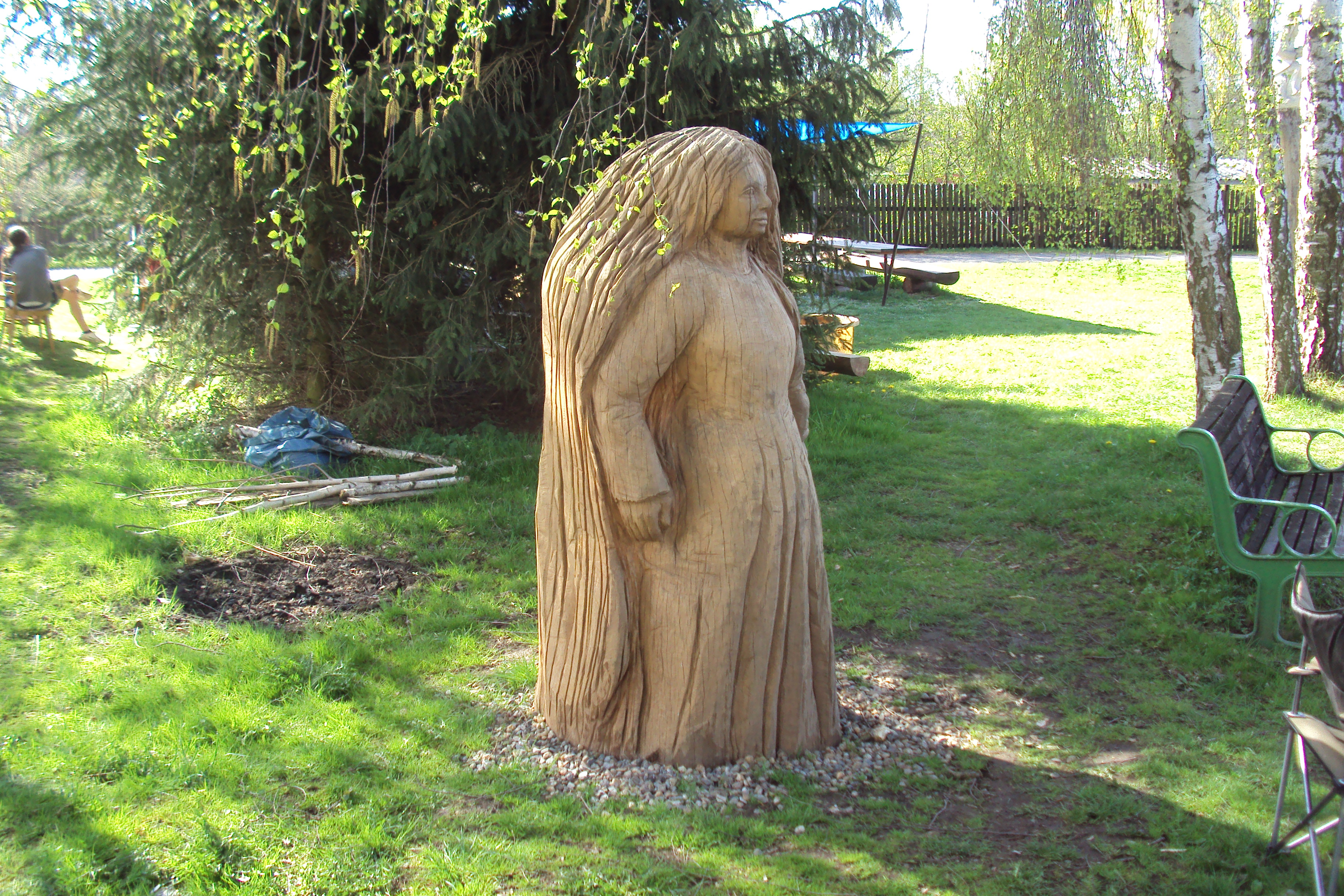 Na břehu rybníka Vratislav je další vyřezaná socha